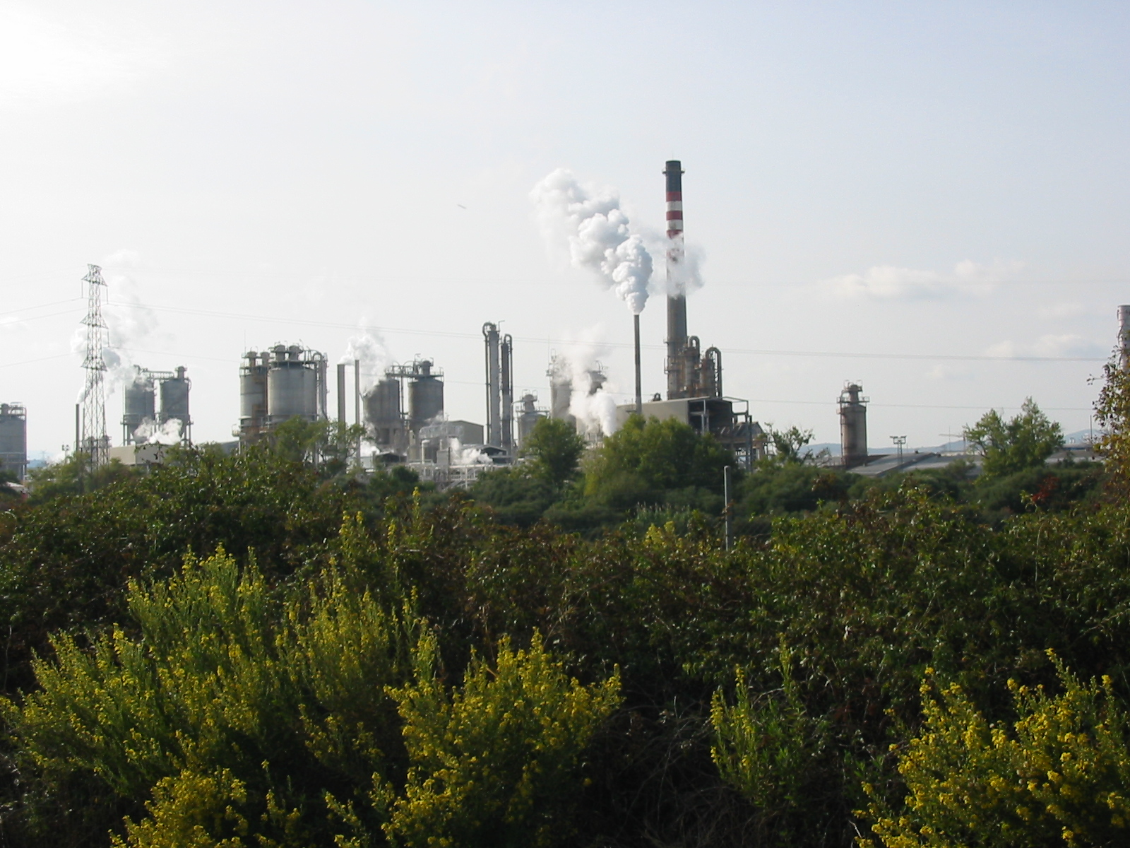 CEPSA Refinery Gibraltar-San Roque, San Roque, Cádiz, Andalusia